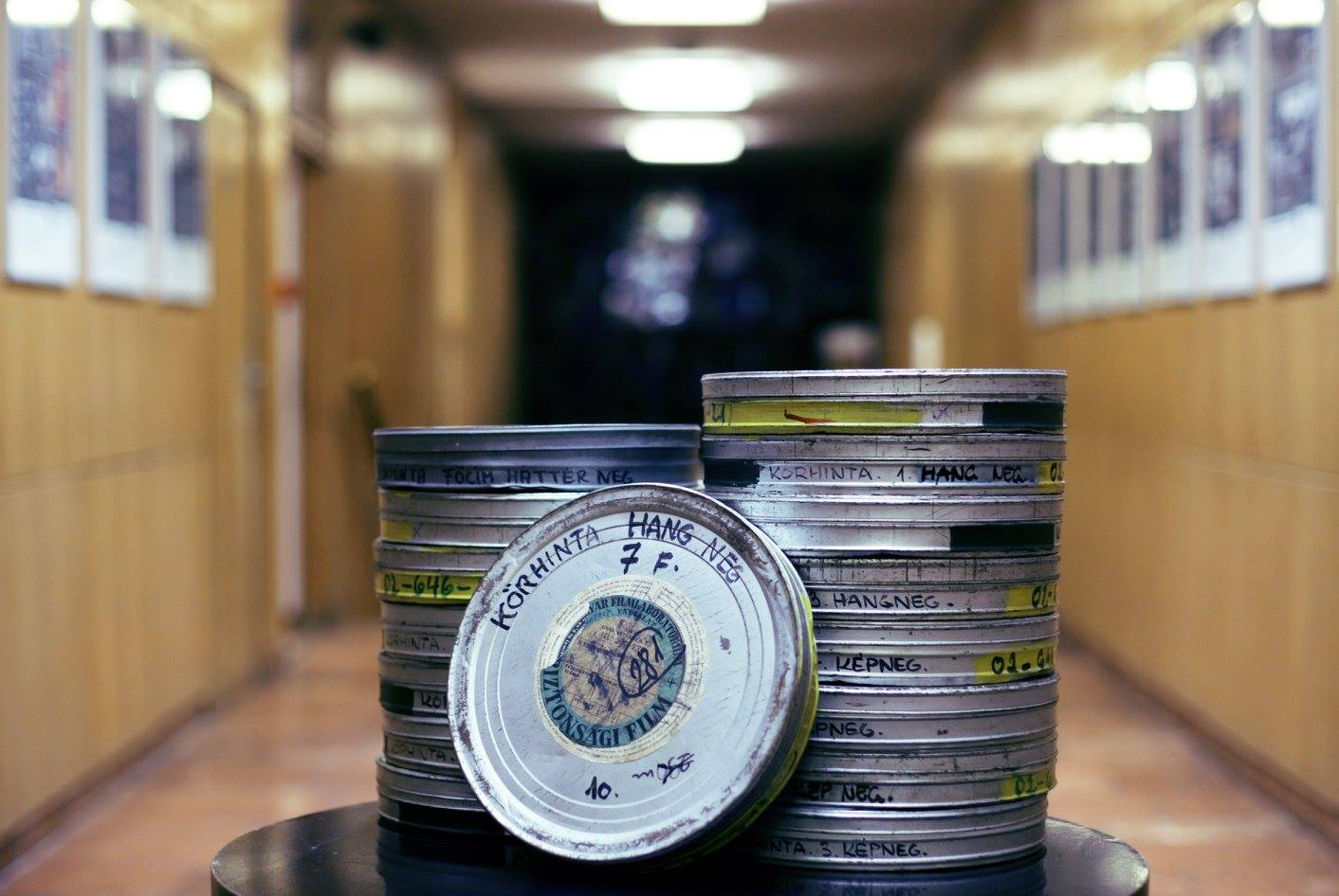 fotó: Juhász Péter